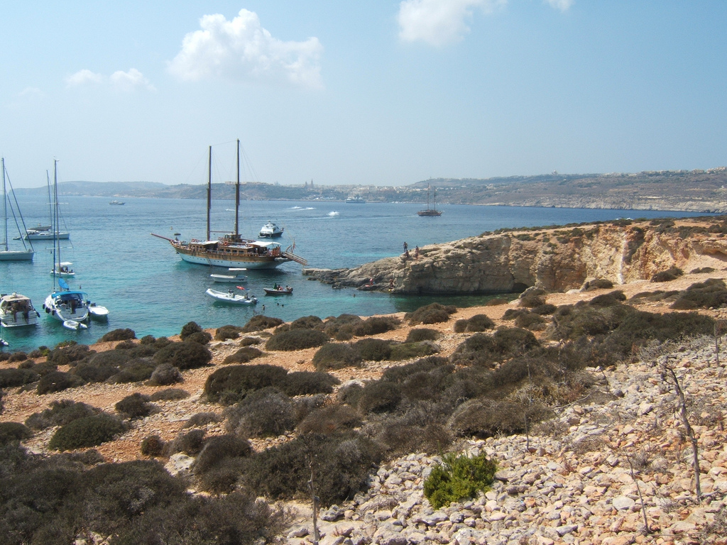 Sailing Ship near Blue Lagoon, Malta